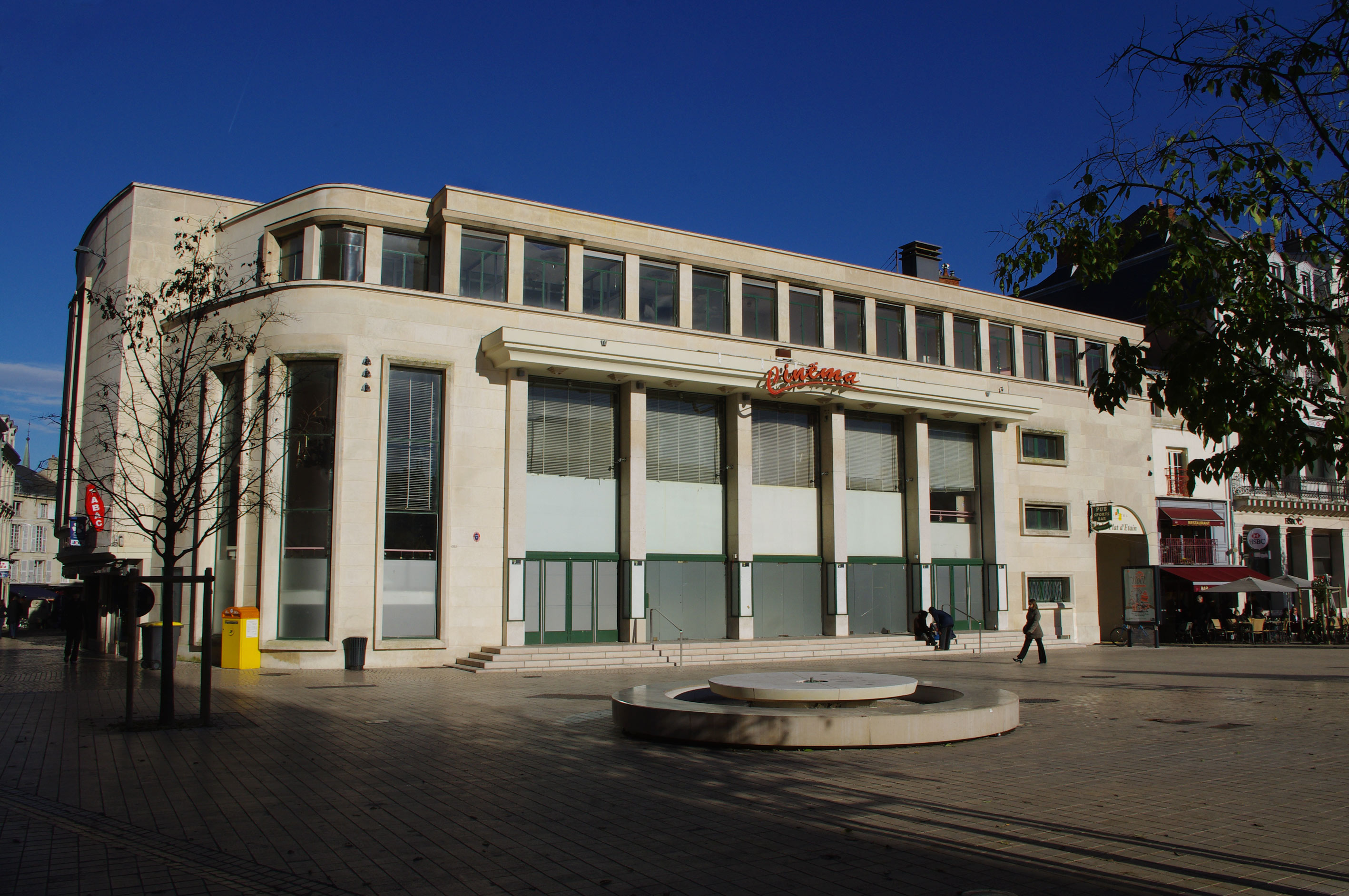 Ancien théâtre municipal de Poitiers (1954) après fermeture (photo décembre 2013)